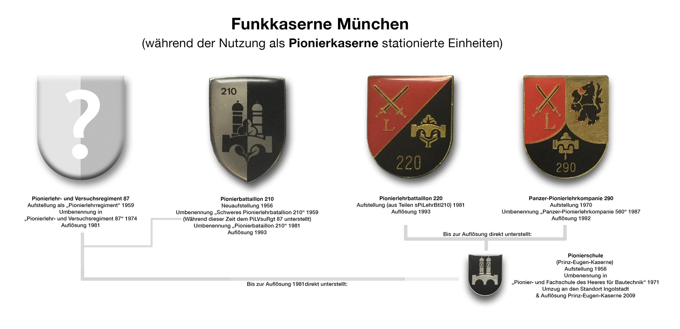 Display mit Infos über die, während der Nutzung als Pionierkaserne in der Münchner Funkkaserne stationierten Einheiten.